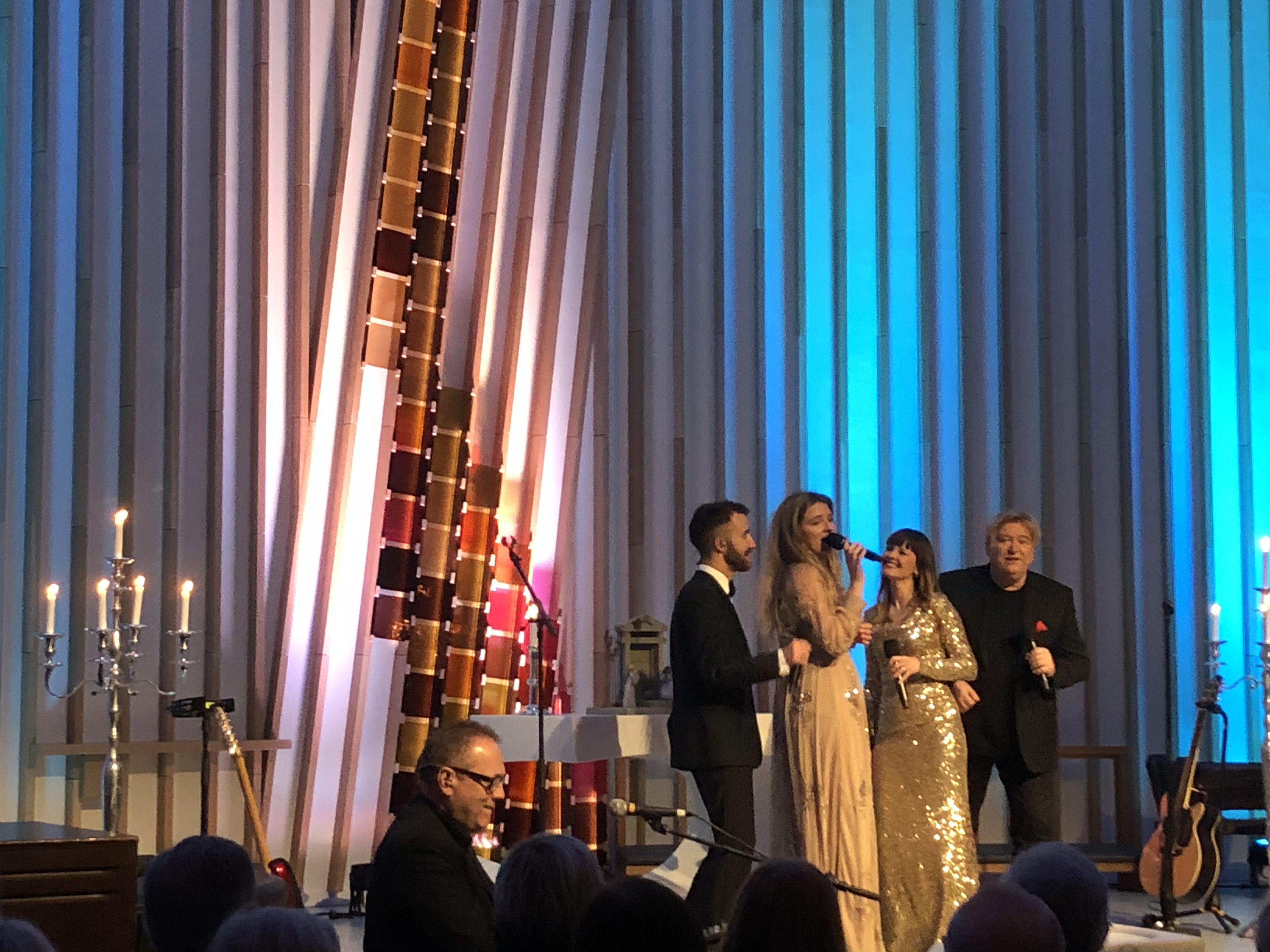 Konsert i Hønefoss kirke, desember 2019, med Trond Lien, Emil Solli-Tangen, Lise Mæland, Lisa Stokke og Jørn Hoel.